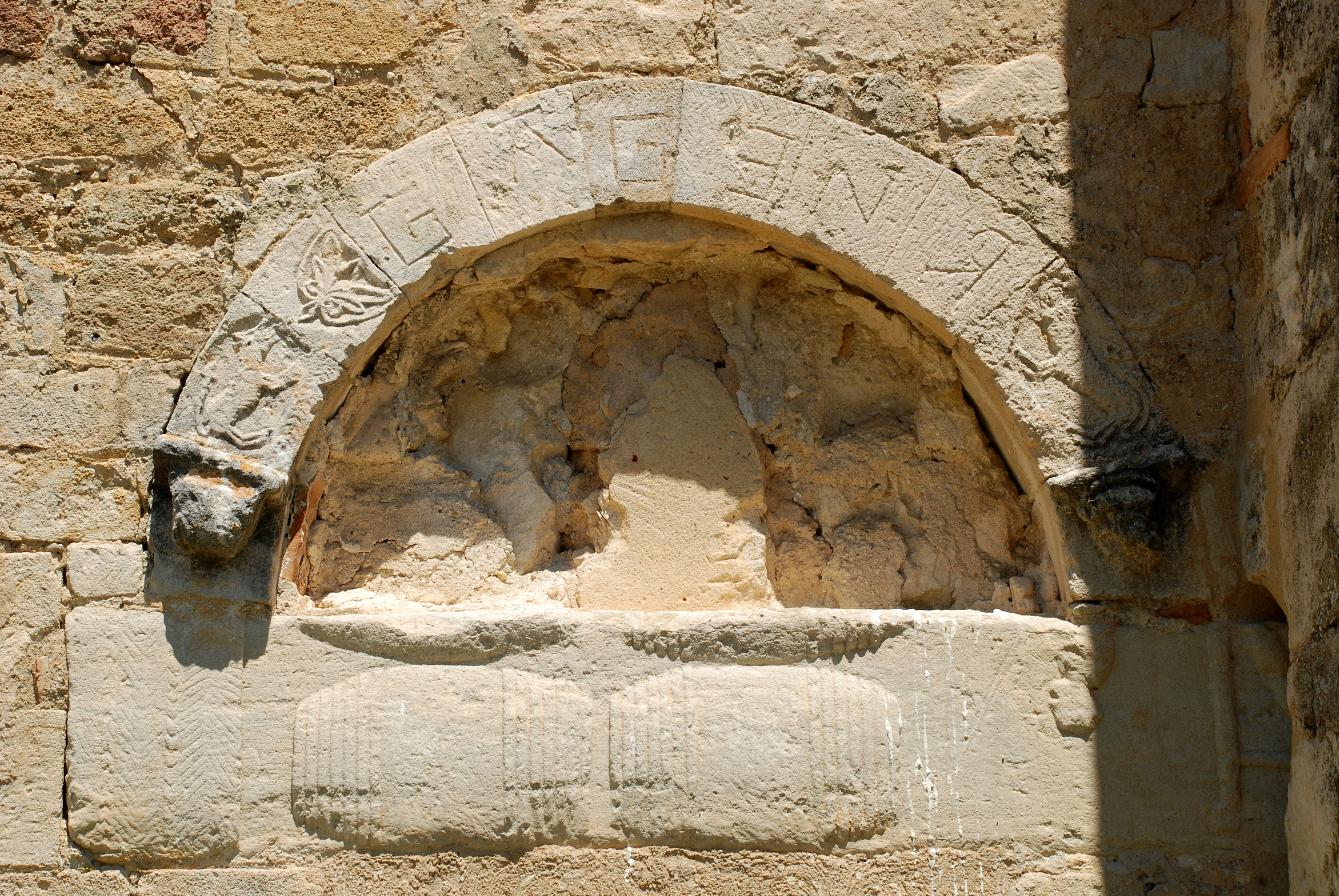 France - Église Saint-Pierre-ès-Liens de Colonzelle